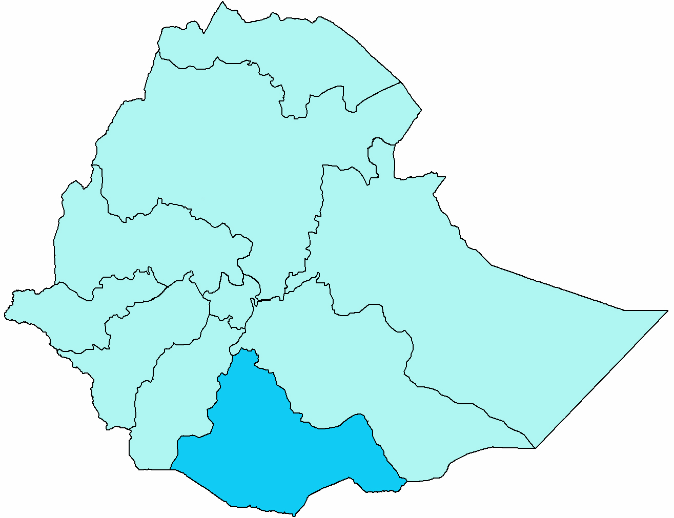 Mappa del vicariato apostolico di Awasa. Fonte per i confini della diocesi: Ethiopian Catholic Church.